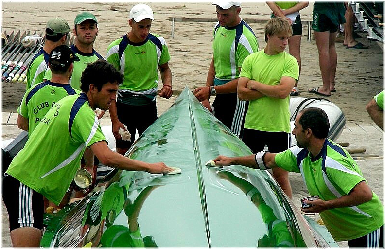 Encerando a trainera na praia de Riazor, A Coruña, Galiza.